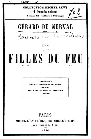 Title page from 1856 edition of Les Filles du Feu